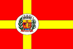 Bandeira de Alvinlândia